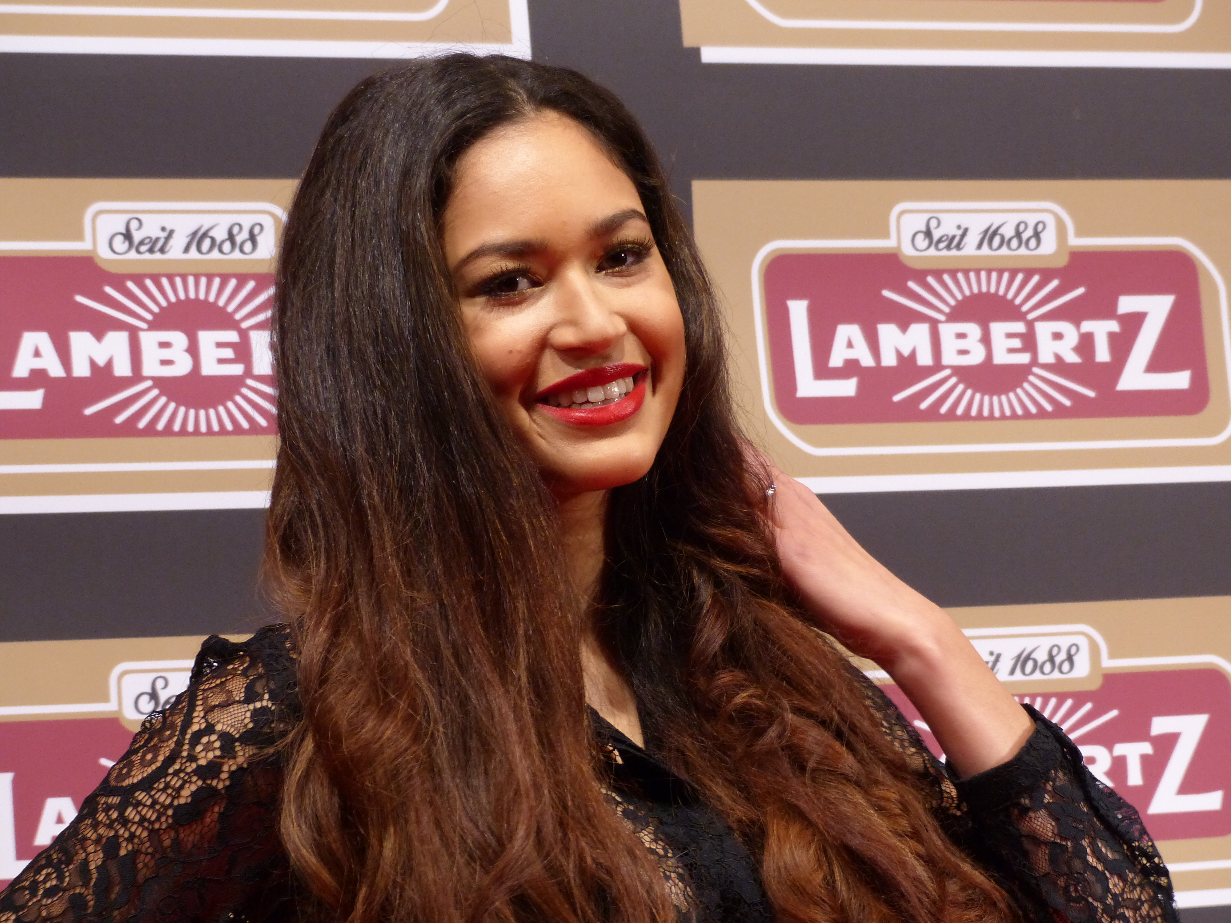 Lovelyn Enebechi bei der Lambertz Monday Night, im Februar 2016.